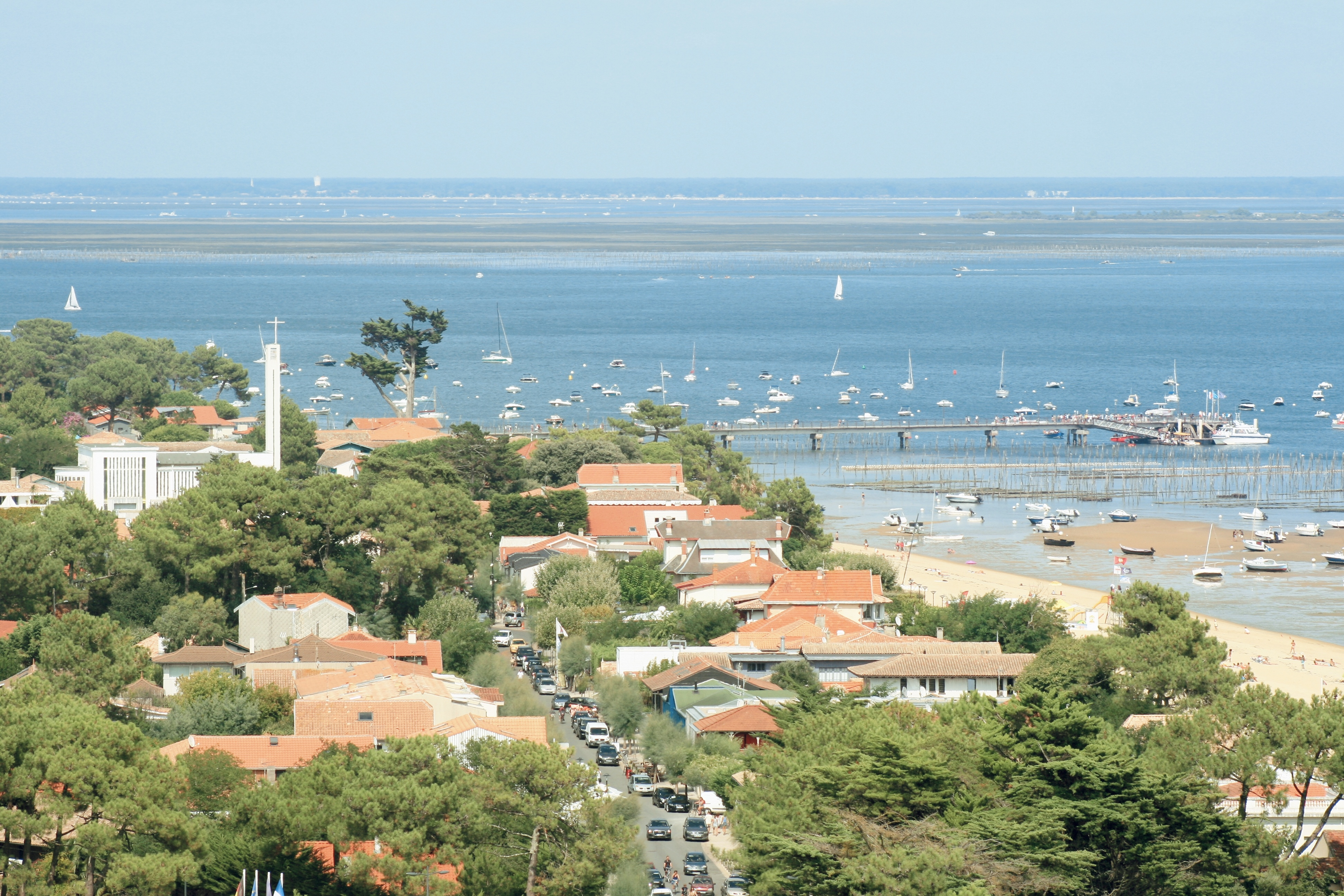 Le quartier Bélisaire au Cap Ferret vu depuis le sommet du phare.